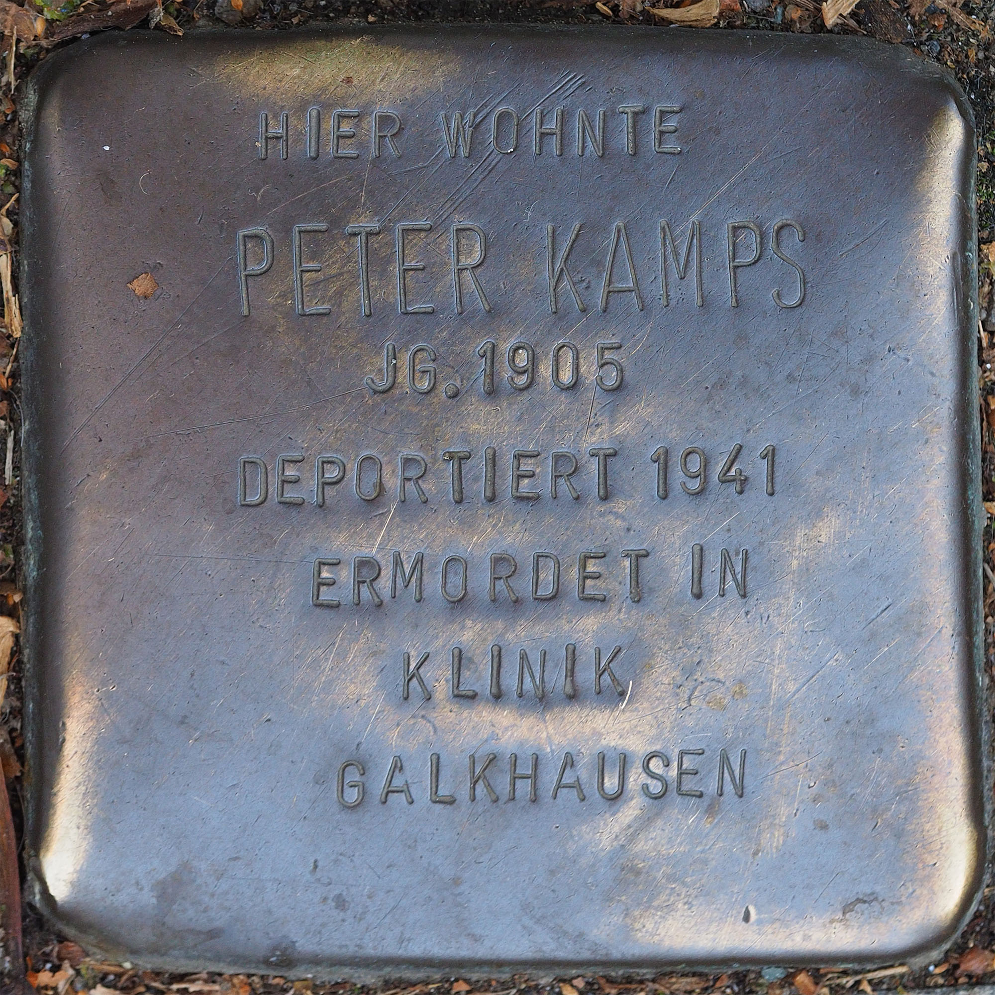 Stolperstein VIE: Kamps, Peter